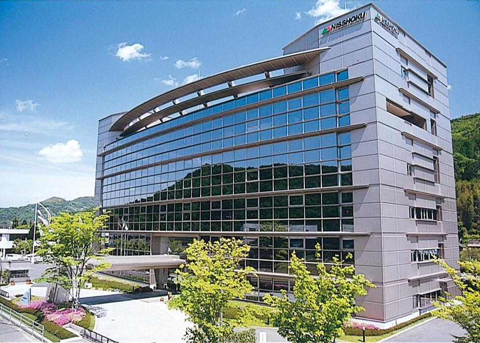 岡山県津山市にある日本植生本社